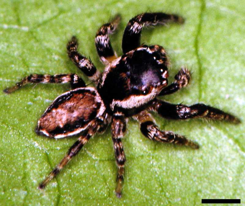 Male Evarcha hoyi jumping spider from Minnesota